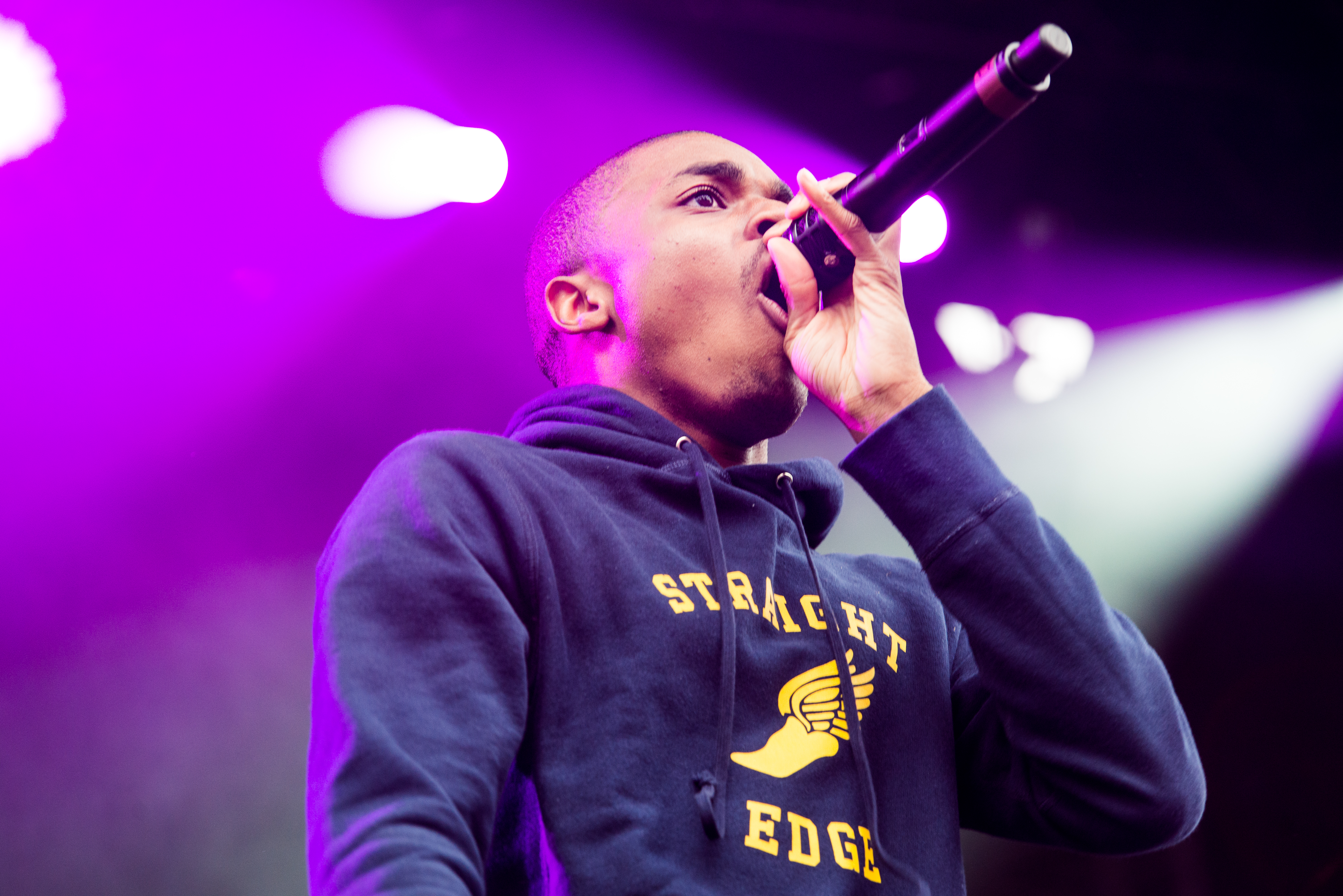 Vince Staples, 2016